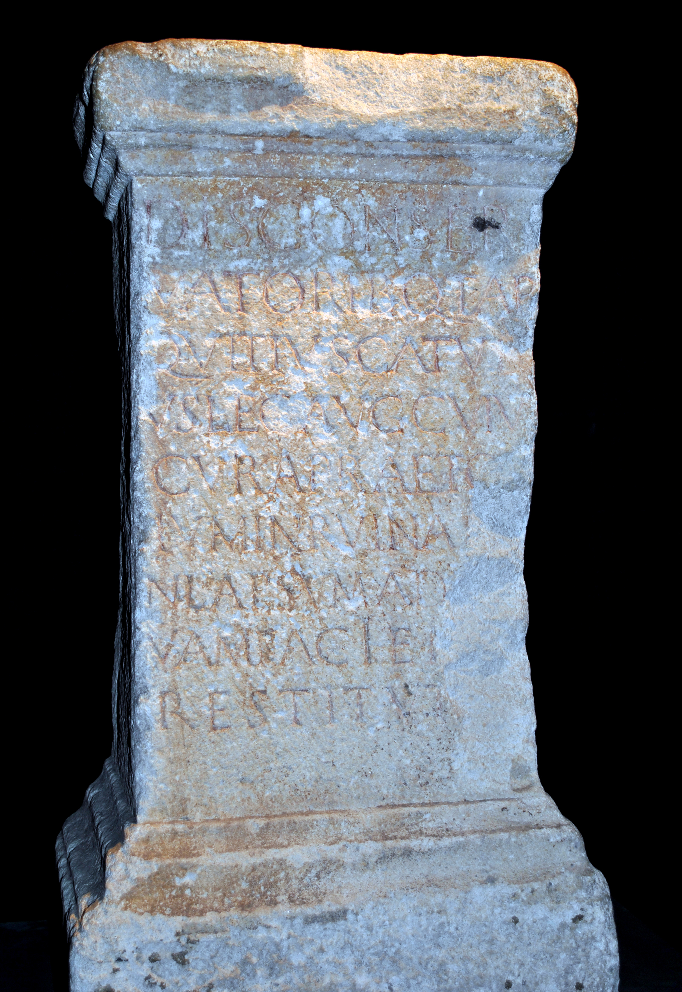 Weiheinschrift für das Praetorium der CCAA, CIL XIII, 08170